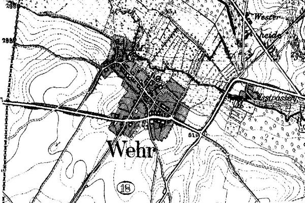 Neuaufnahme 1891 -1912